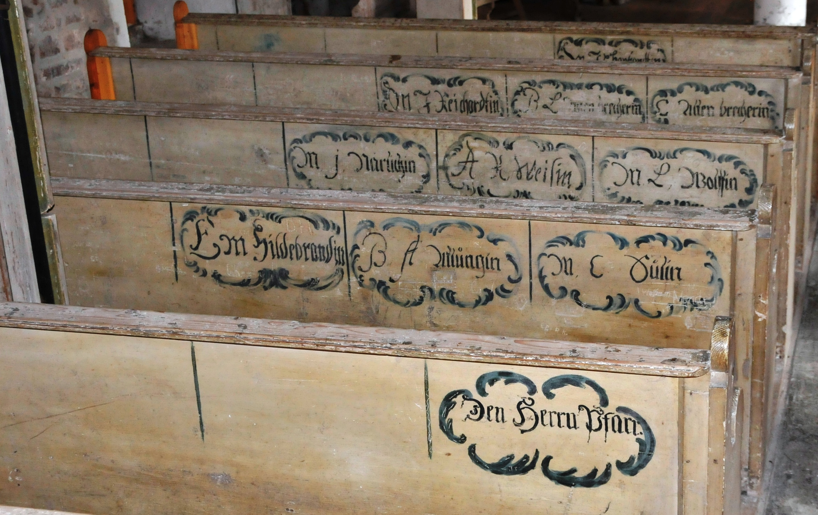 Gamstädt, Kirche